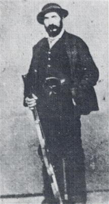 Il brigante Giuseppe Caruso, copyright scaduto